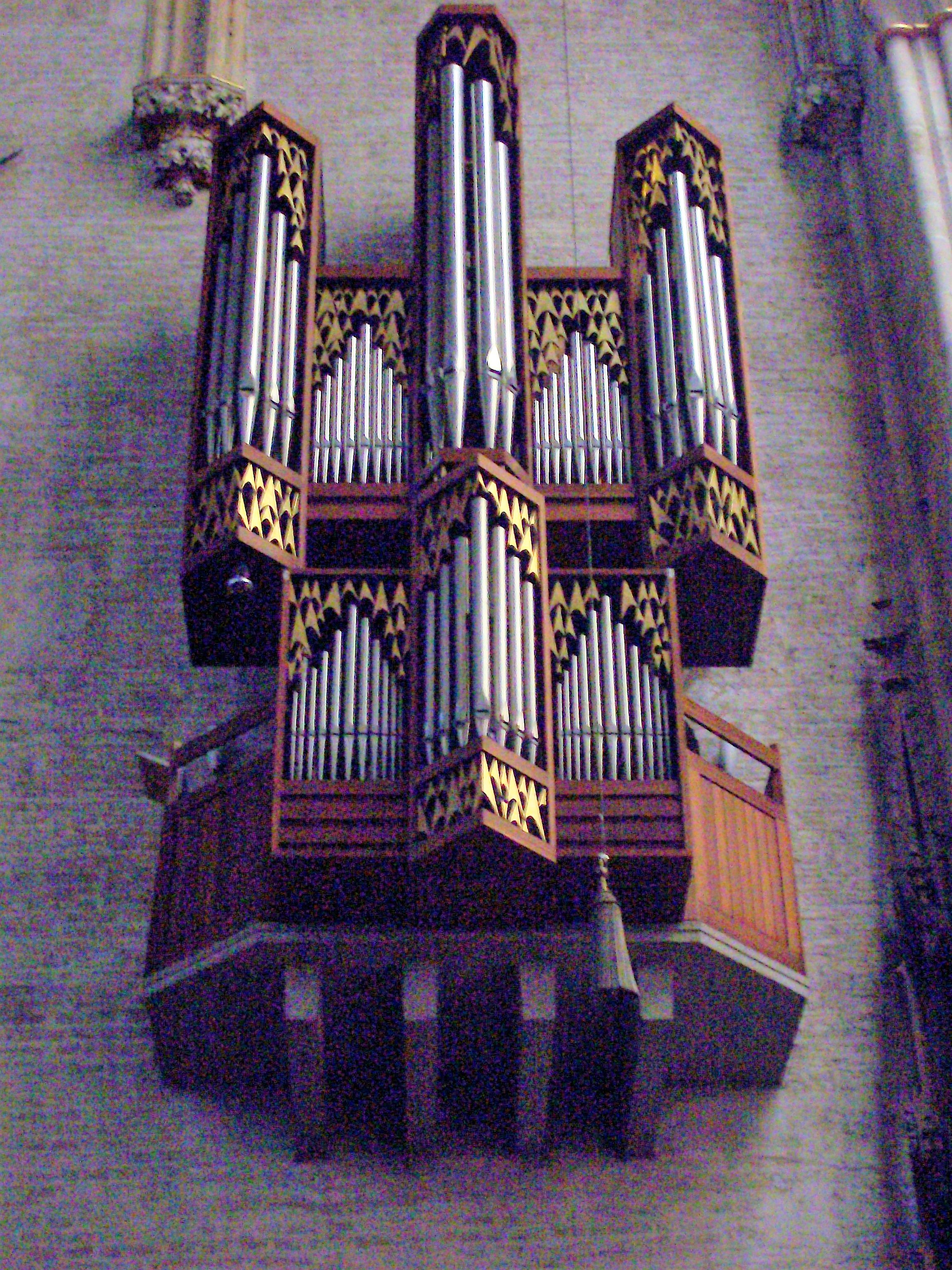 Schwalbennestorgel im Ulmer Münster